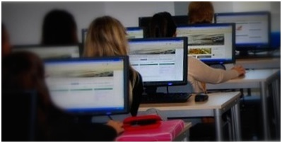 pantalla de acceso a la web